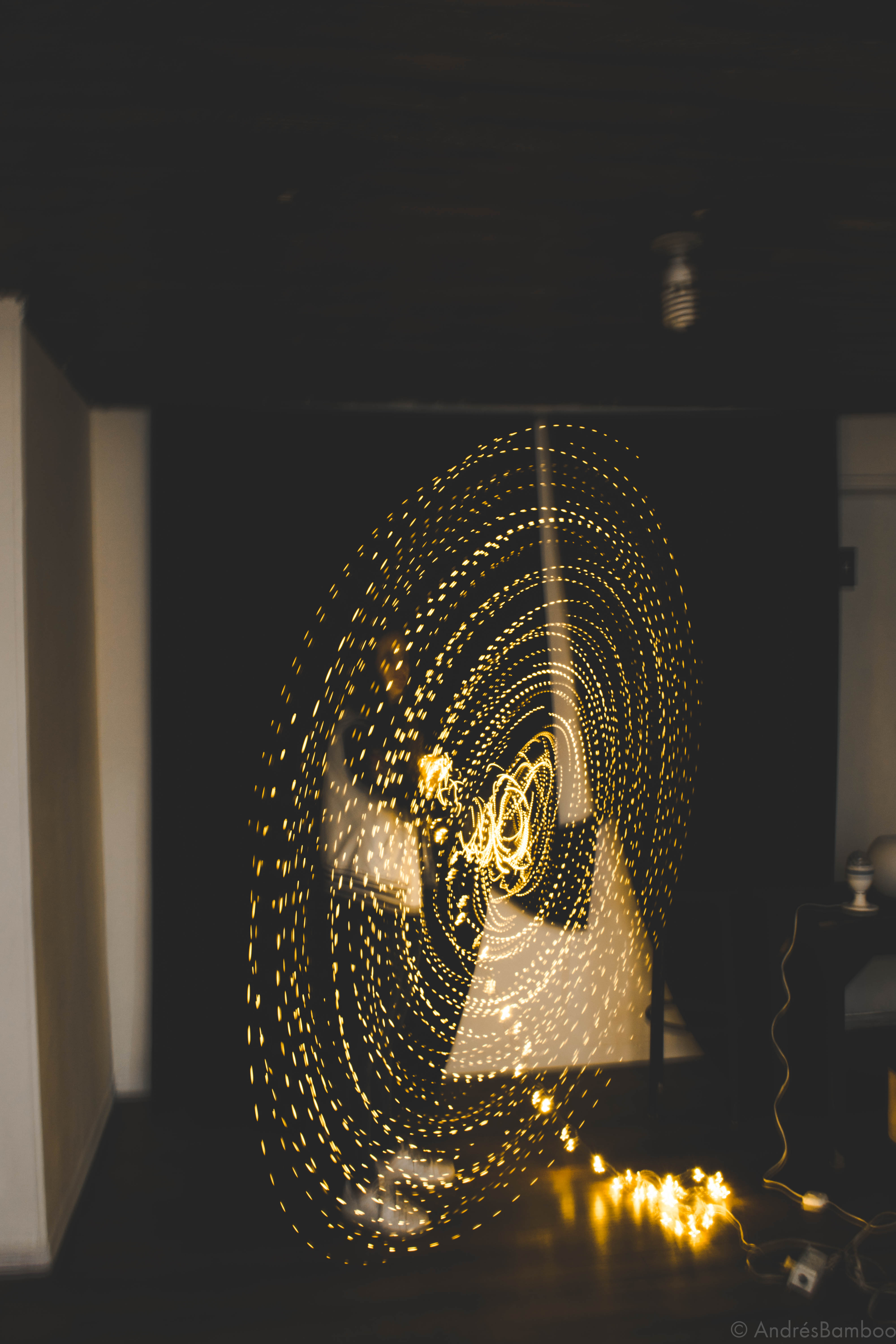 Fisiograma producido por Rotación.